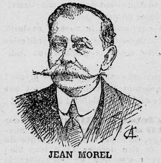 Portrait de Jean Morel en 1913.